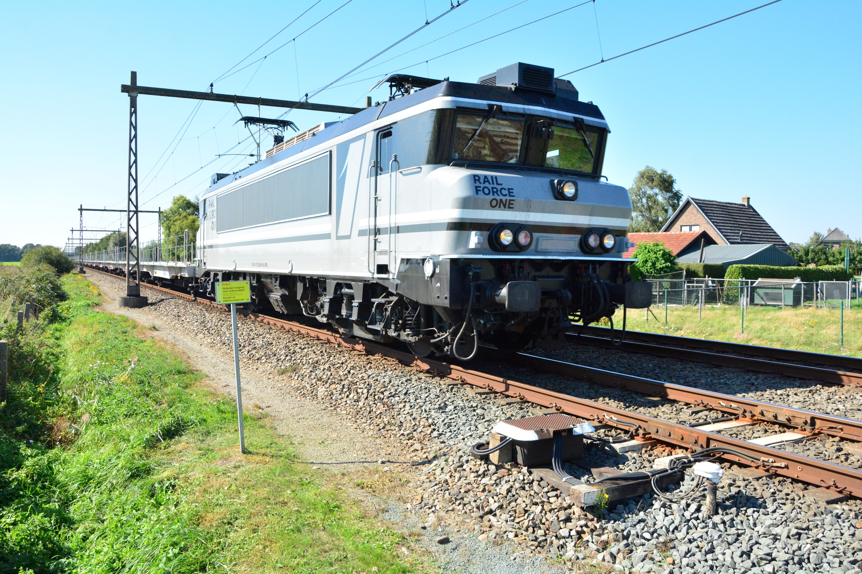 Rail Force One 1829 passeert de Woudhuizerweg ter hoogte van Teuge.